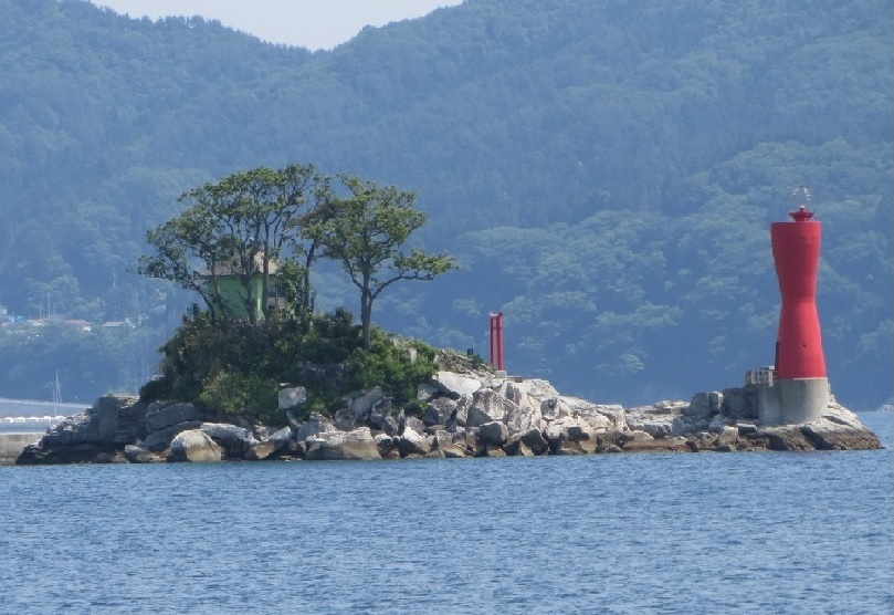 大槌湾にある蓬莱島の遠景。赤浜地区から撮影